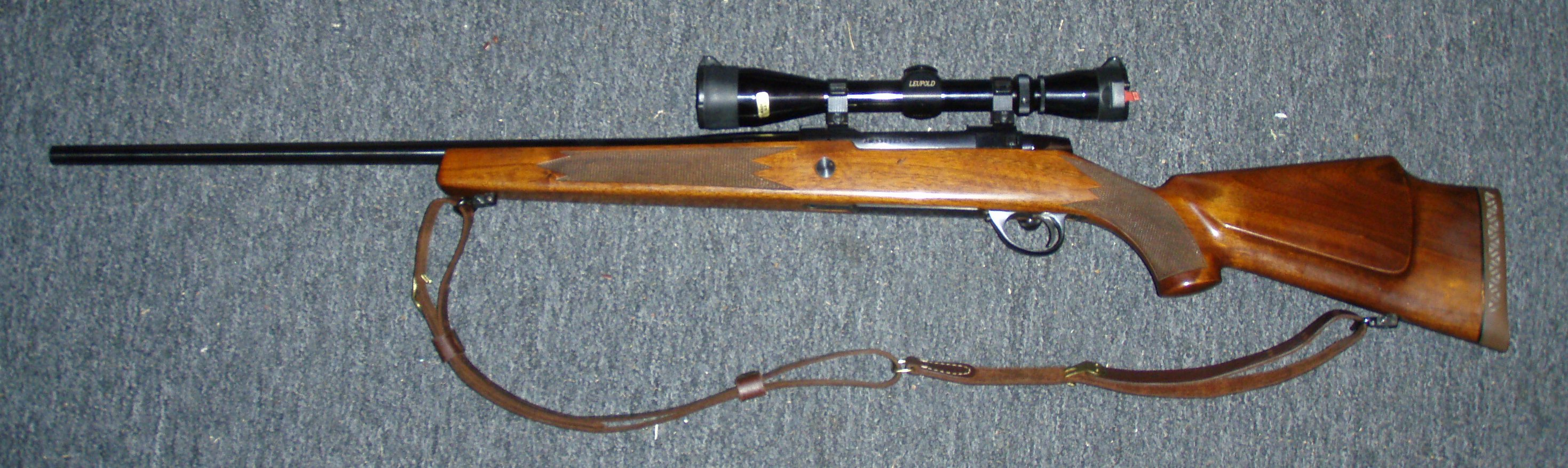 Sako Rifle in .25-06